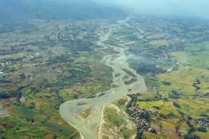 sungai alas